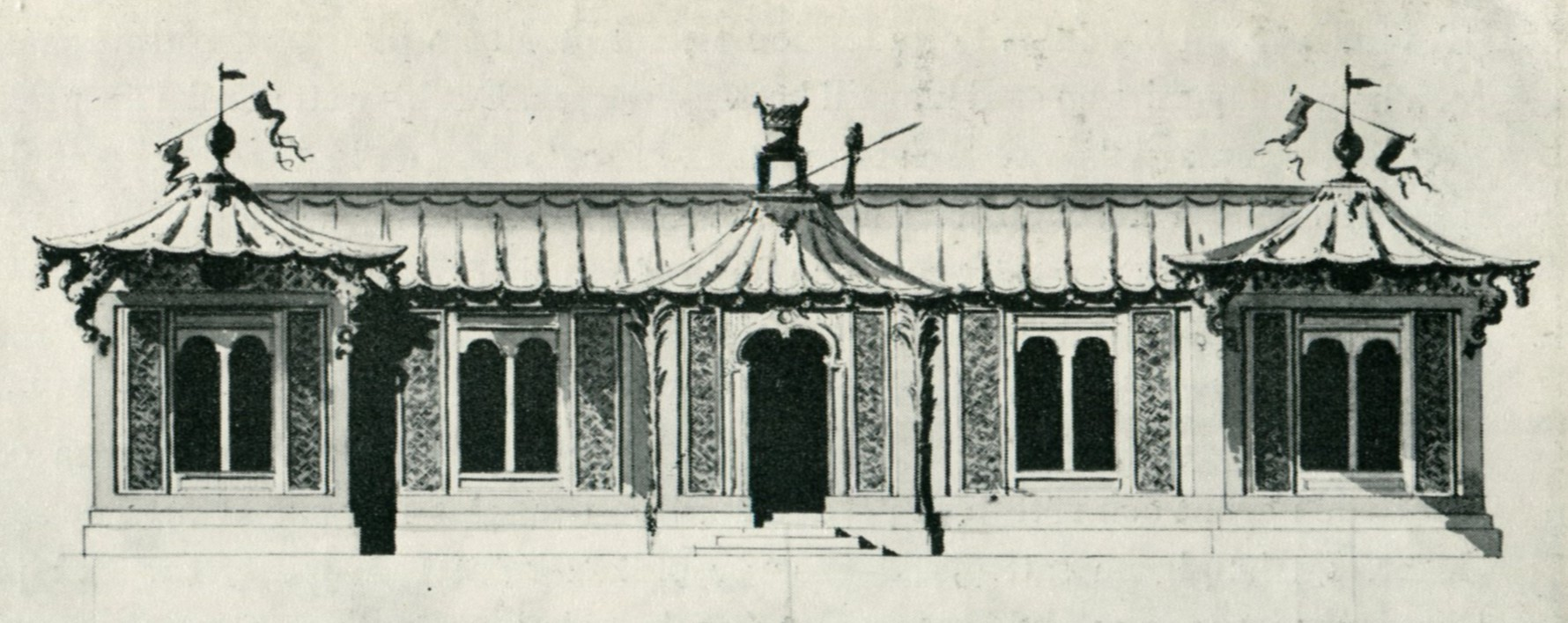 Kina slotts första paviljong